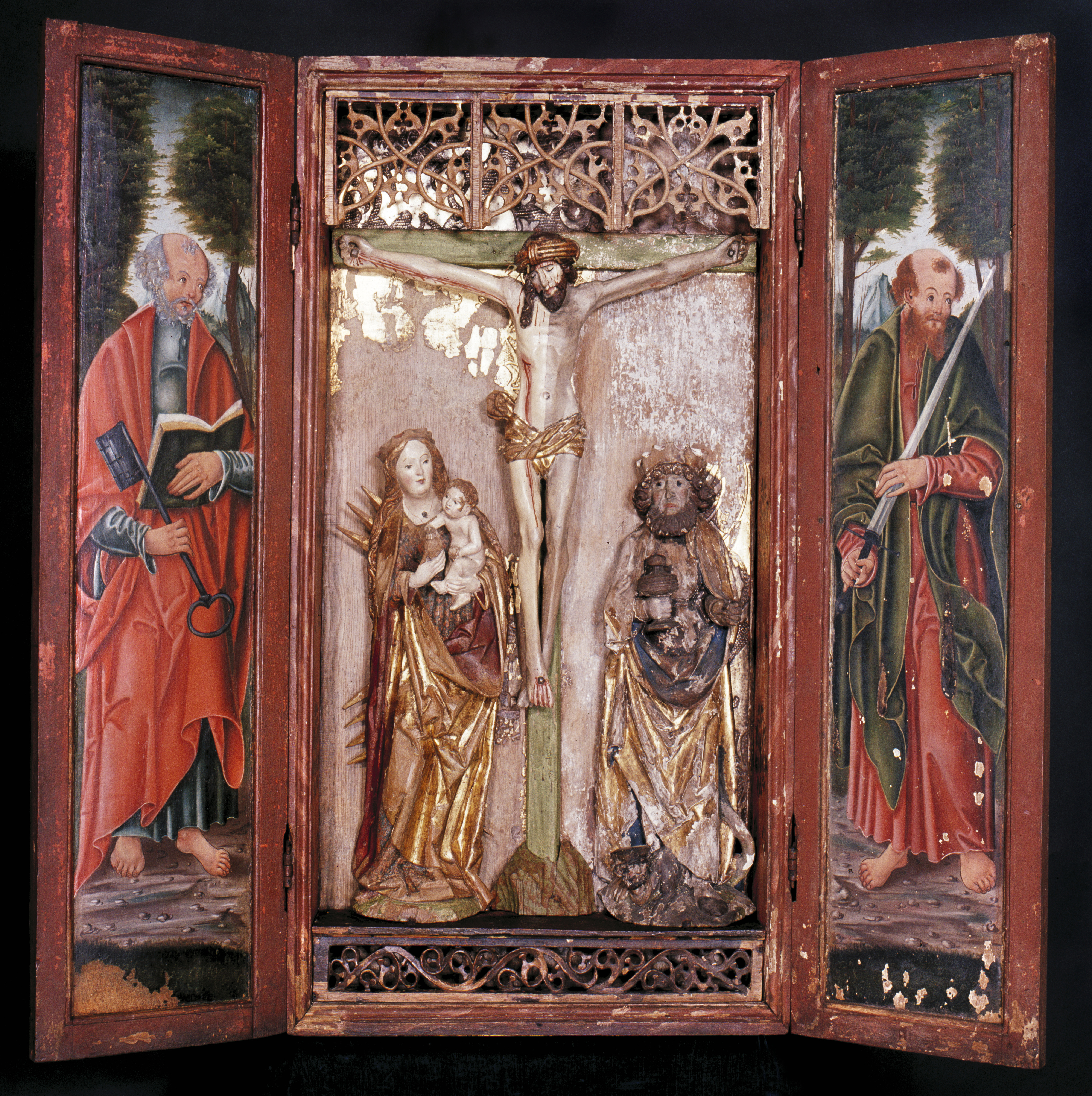 Alterskap fra Veien kirke, senere lagret i Hopen kirke før overføring til Oldsaksamlingen. Foto: Håkan Lindberg, fra Unimus (jf. søk, s. 9).